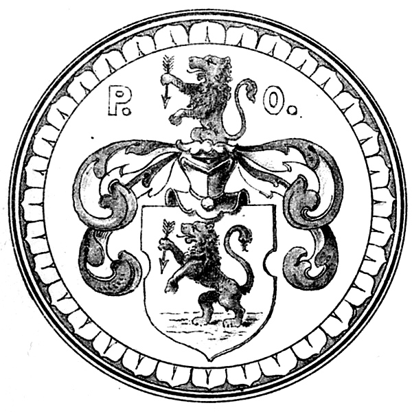 Wappen der Heilbronner Patrizier Orth